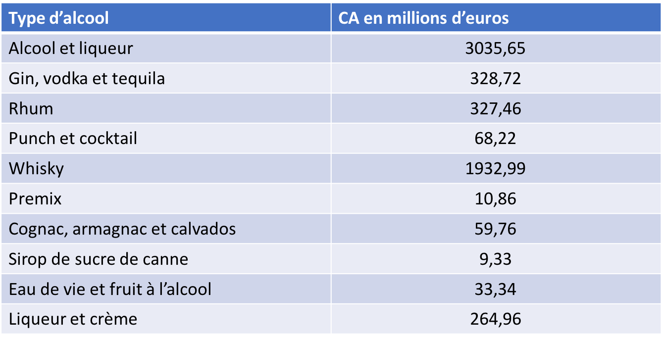 Tableau sur le CA par alcool